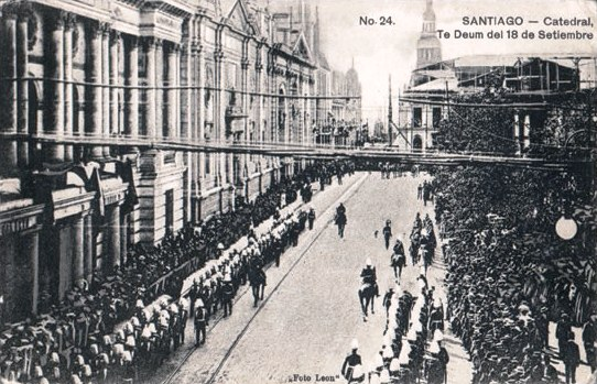 El Te Deum Ecuménico de Fiestas Patrias es una liturgia de acción de gracias realizada en Chile cada 18 de septiembre (a las 11 horas) en la Catedral Metropolitana de Santiago, con ocasión de las Fiestas Patrias que se celebran en ese país. En él participan las maximas autoridades del país encabezadas por el Presidente de la República, y de casi todas las confesiones religiosas del país, ya que desde el año 1971, a solicitud expresa del entonces recién asumido Presidente de la República Salvador Allende, el Te Deum tiene un carácter ecuménico. Ese año, el entonces Arzobispo de Santiago, el Cardenal Raúl Silva Henríquez, invitó a obispos y pastores de otras Iglesias cristianas a participar con sus oraciones en esta ceremonia.